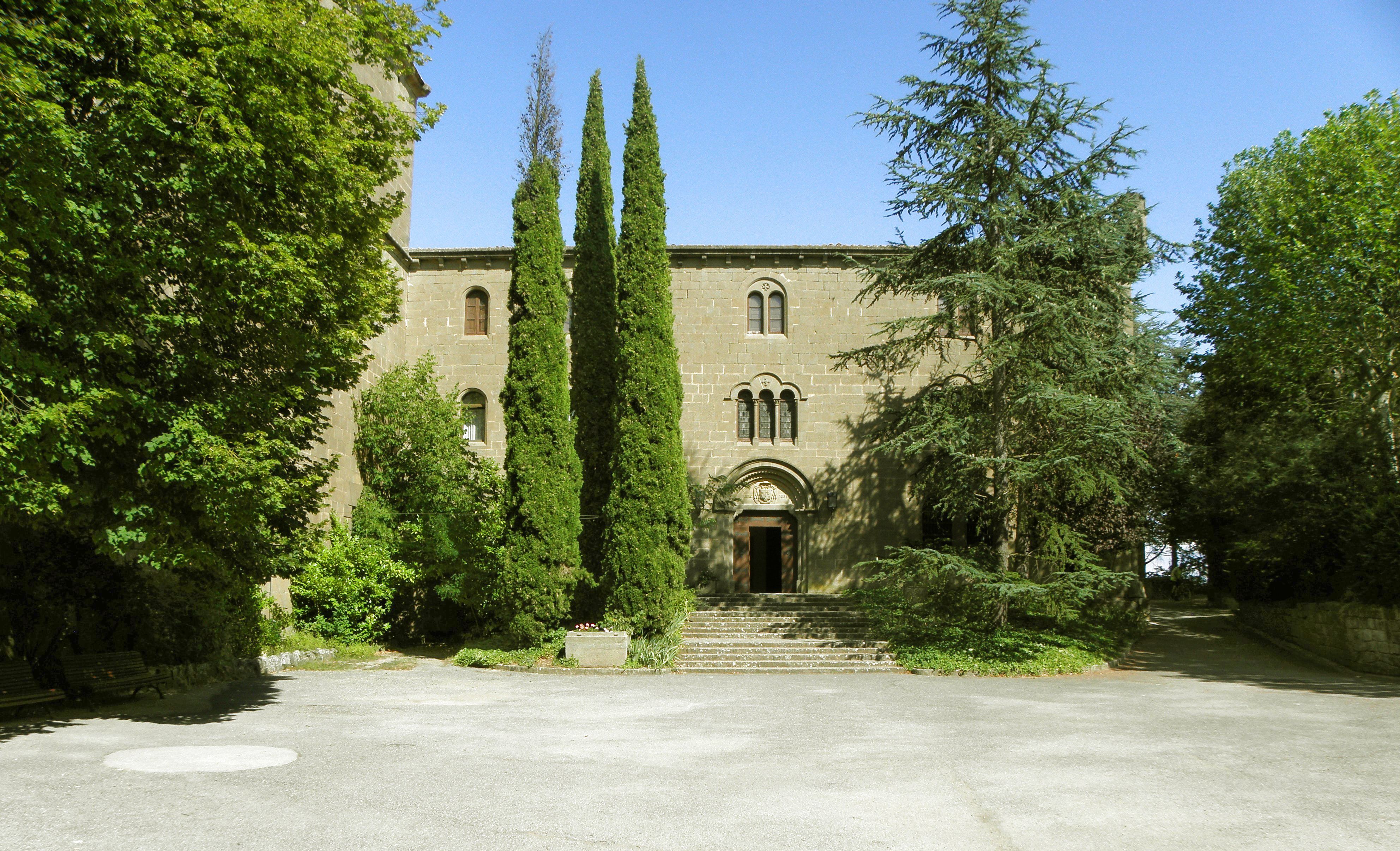 La façana oest del monestir del Miracle (riner, Solsonès) que tanca la plaça del Miracle per la banda de llevant.